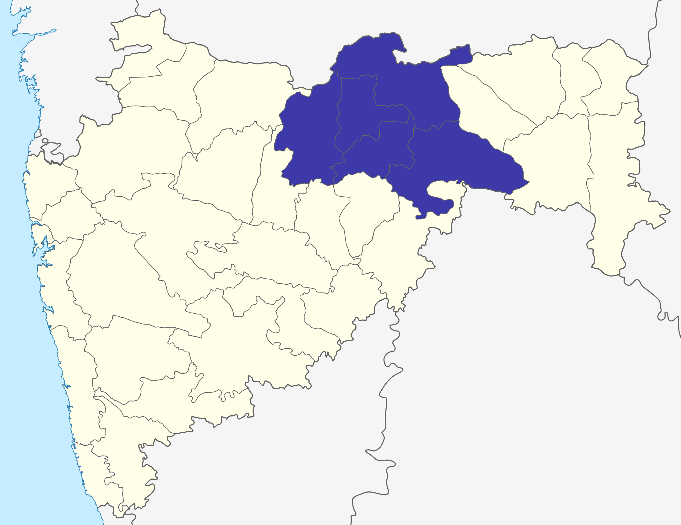 Amravati division in Maharashtra, India